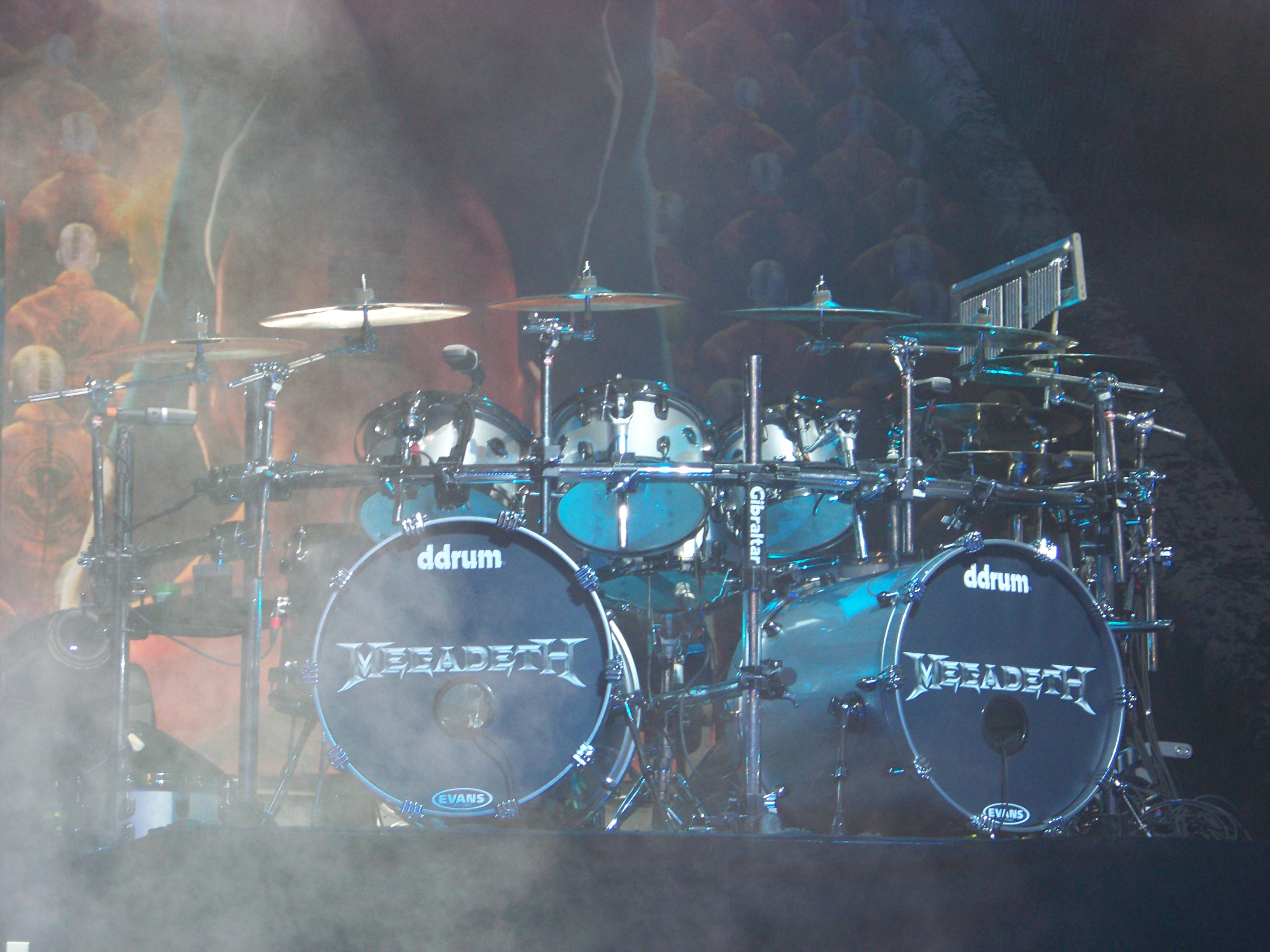 Фото ударной установки DDrum Шона Дровера из Megadeth. Март 2011, Киев, концерт Megadeth и Slayer.